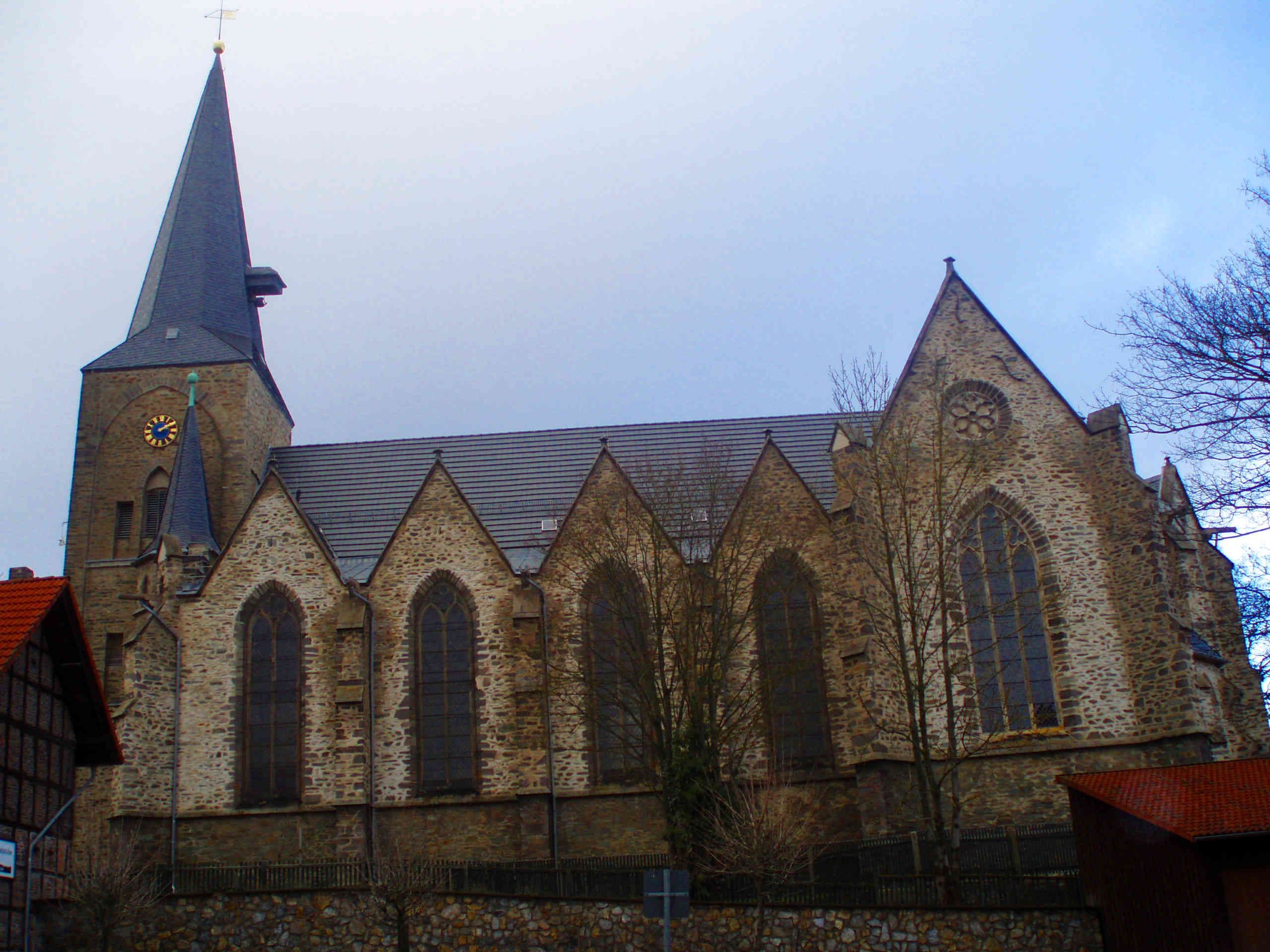 Kirche Elbingerode